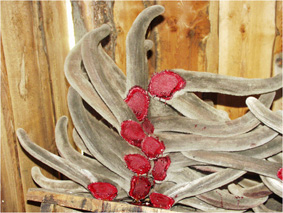 свежесрезанные панты алтайского марала Bân-lâm-gú: 鹿茸 (lo̍k-jiông)。